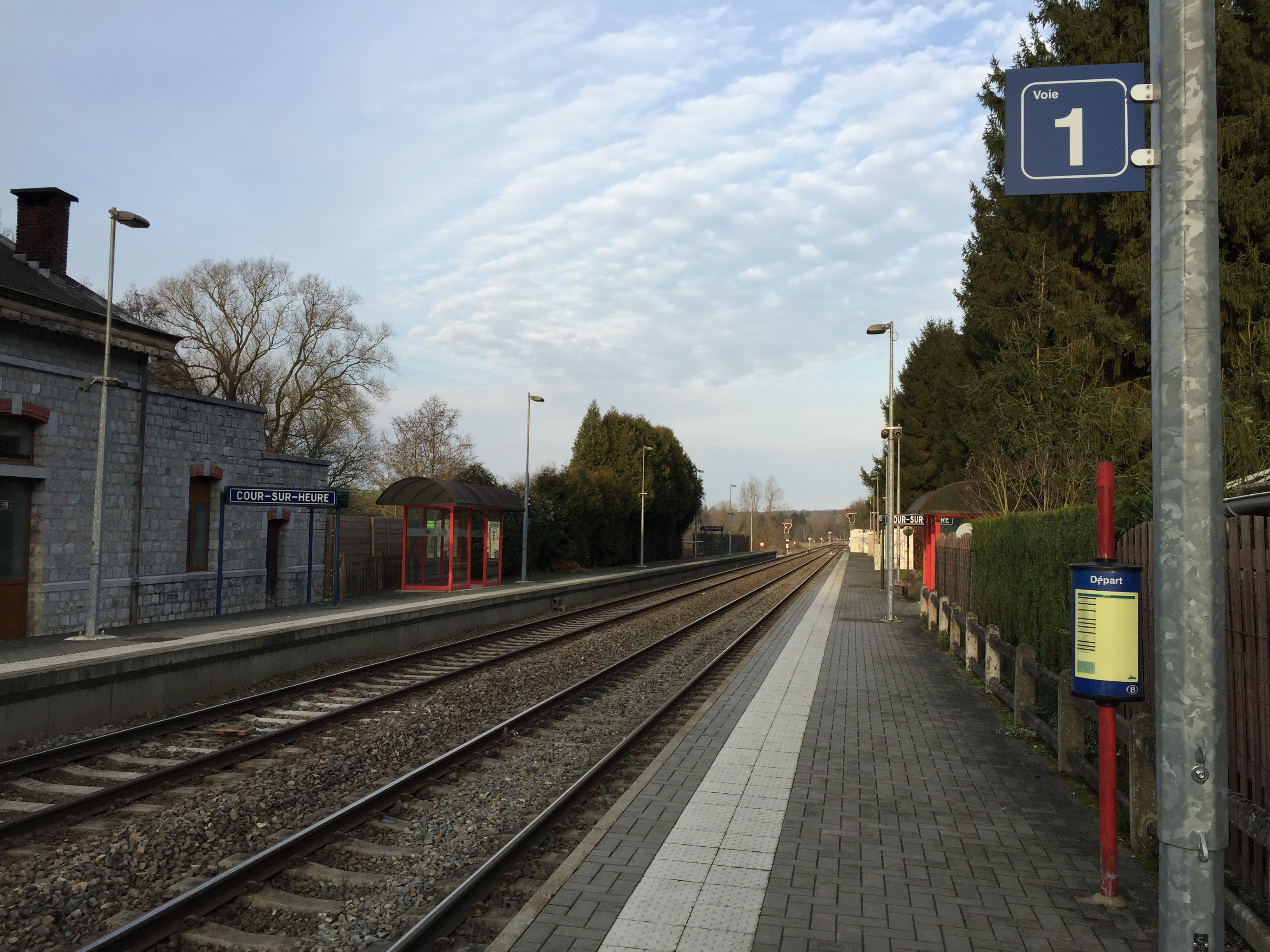 Gare de Cour-sur-Heure - Vue Quai 1